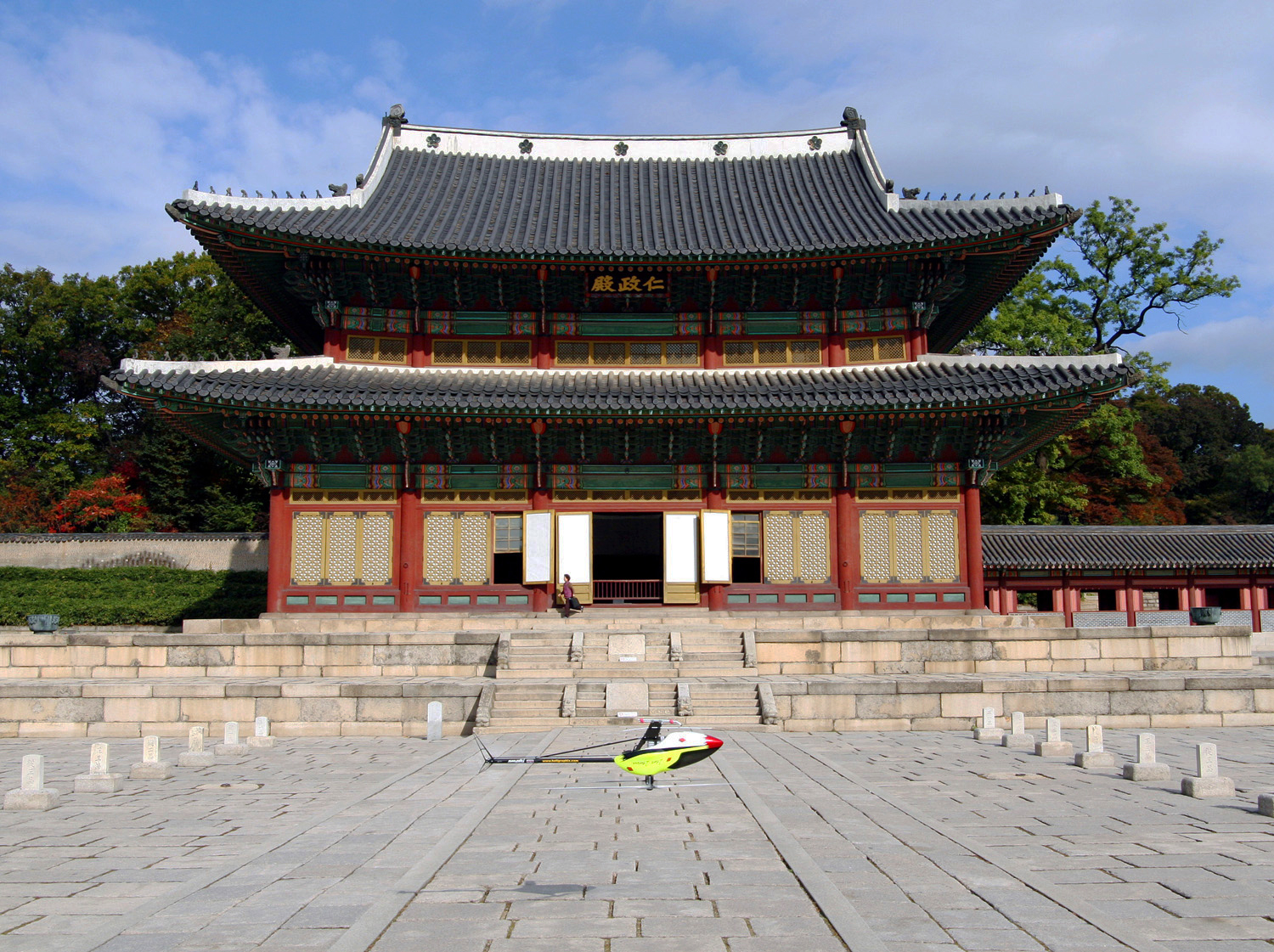 World Scenic Flights in Südkorea - World Scenic Flights-Heli vor dem UNESCO Weltkulturerbe Changdeokgung